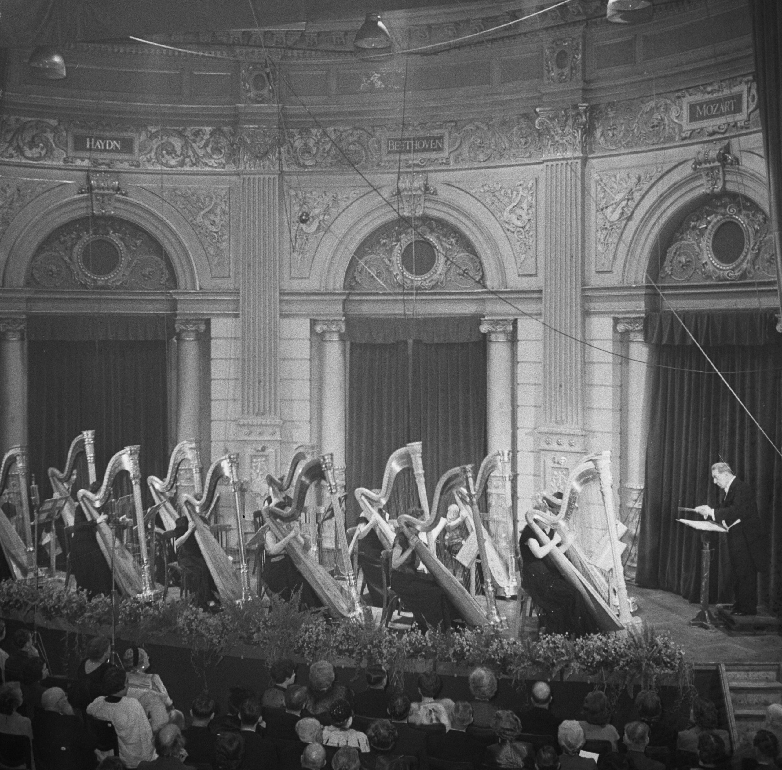 Collectie / Archief : Fotocollectie Anefo Reportage / Serie : [ onbekend ] Beschrijving : Rosa Spier huldigingsavond 60 jaar Datum : 13 november 1951 Locatie : Amsterdam Trefwoorden : harpen, huldigingen Persoonsnaam : Spier, Rosa Fotograaf : Noske, J.D. / Anefo Auteursrechthebbende : Nationaal Archief Materiaalsoort : Negatief (zwart/wit) Nummer archiefinventaris : bekijk toegang 2.24.01.03 Bestanddeelnummer : 904-8513 Reacties Geplaatst door Geschiedenismens op 14 juni 2016 - 18:23. Kleine zaal van het Concertgebouw. Plaats: Amsterdam, Noord-Holland